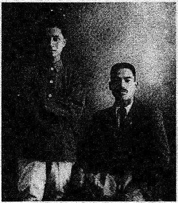 中文（台灣）: 李延禧與益子逞輔